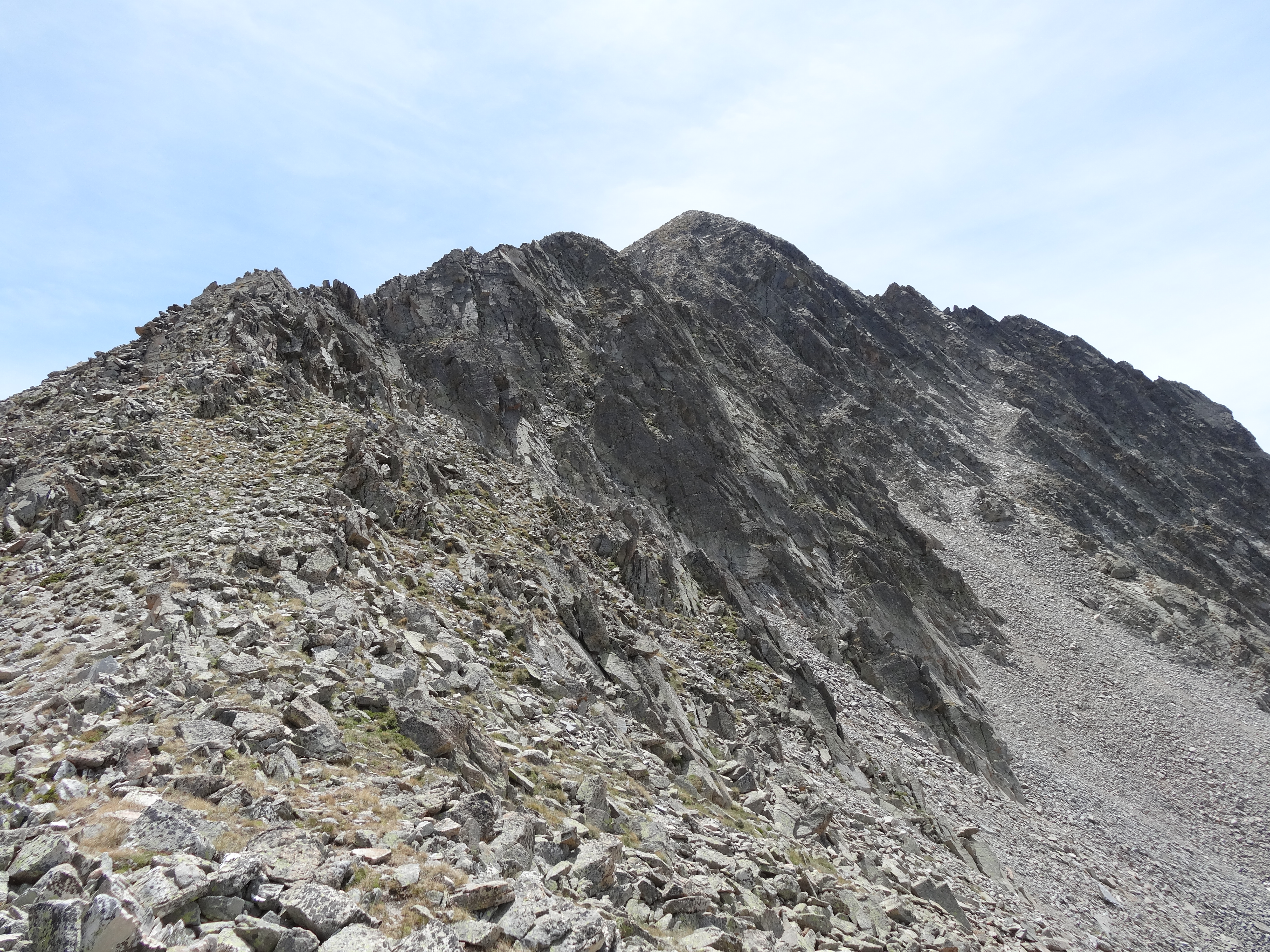 Cara nord del Pic de Infern (juliol 2012)